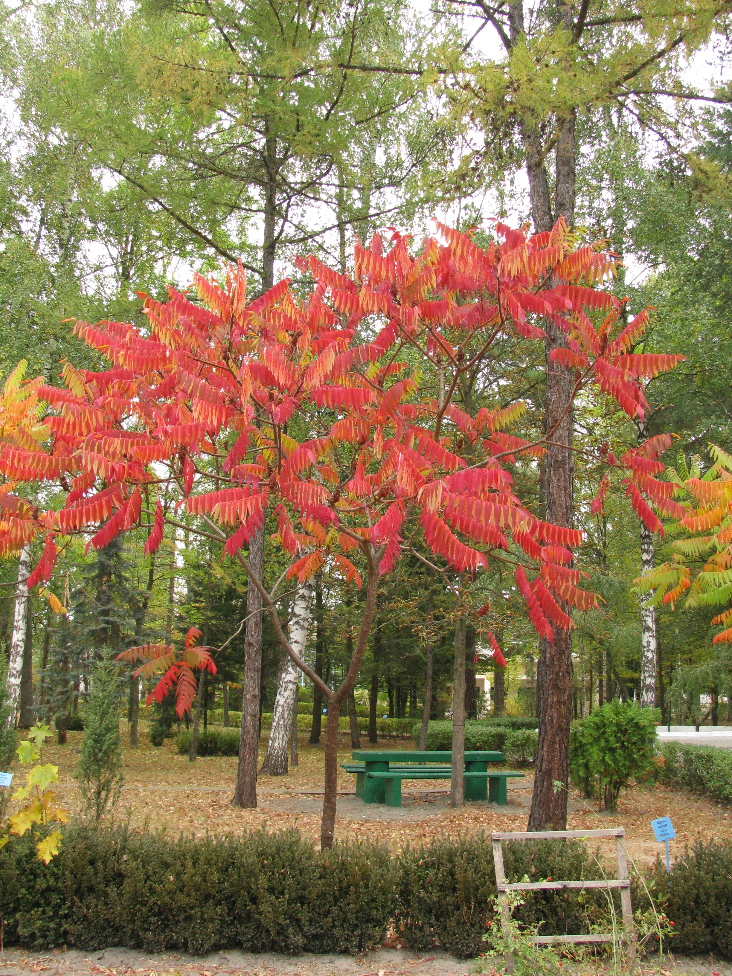 Гамарня, Малинський р-н, ДП «Малинське ЛГ», Слобідське лісництво, кв.40, 41, 42, 43